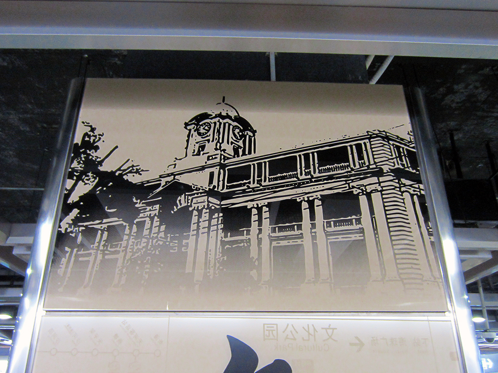 文化公園站柱面裝飾